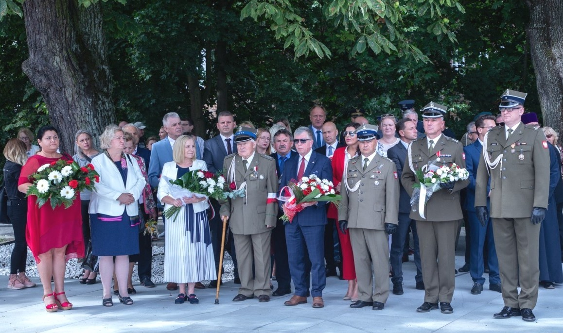 Poseł Michał Jach, (15.08.2019)